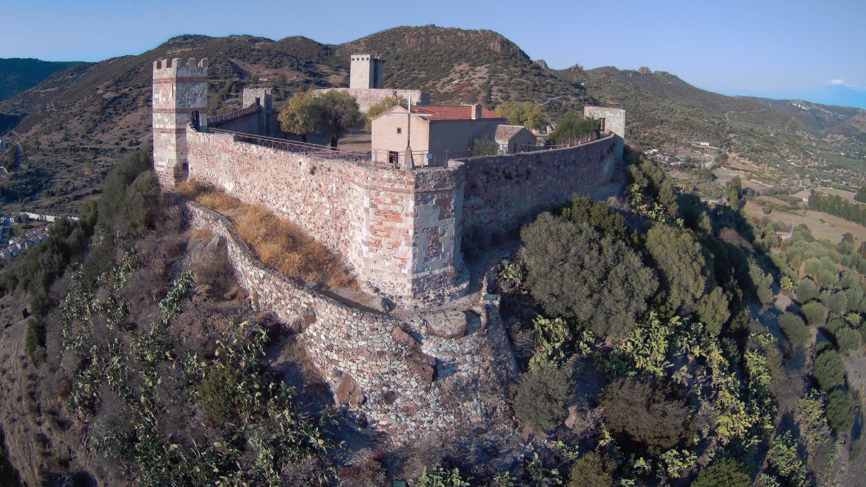 La chiesa di Nostra Signora di Regnos Altos all'interno delle mura del Castello di Serravalle a Bosa (OR). Fotografia realizzata al tramonto tramite APR (Aeromobile a Pilotaggio Remoto). La ripresa è stata realizzata da personale e aeromobile regolarmente abilitati, autorizzati e nel rispetto di leggi e regolamenti in materia di lavoro aereo. This is a photo of a monument which is part of cultural heritage of Italy.